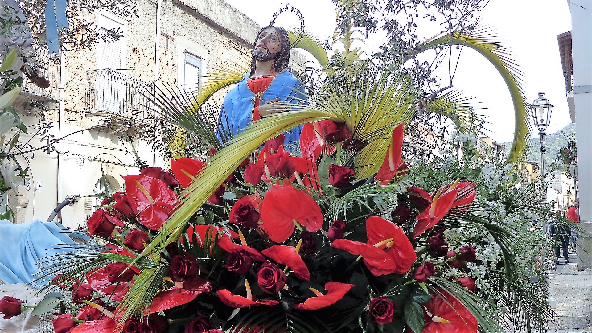 Getsemani